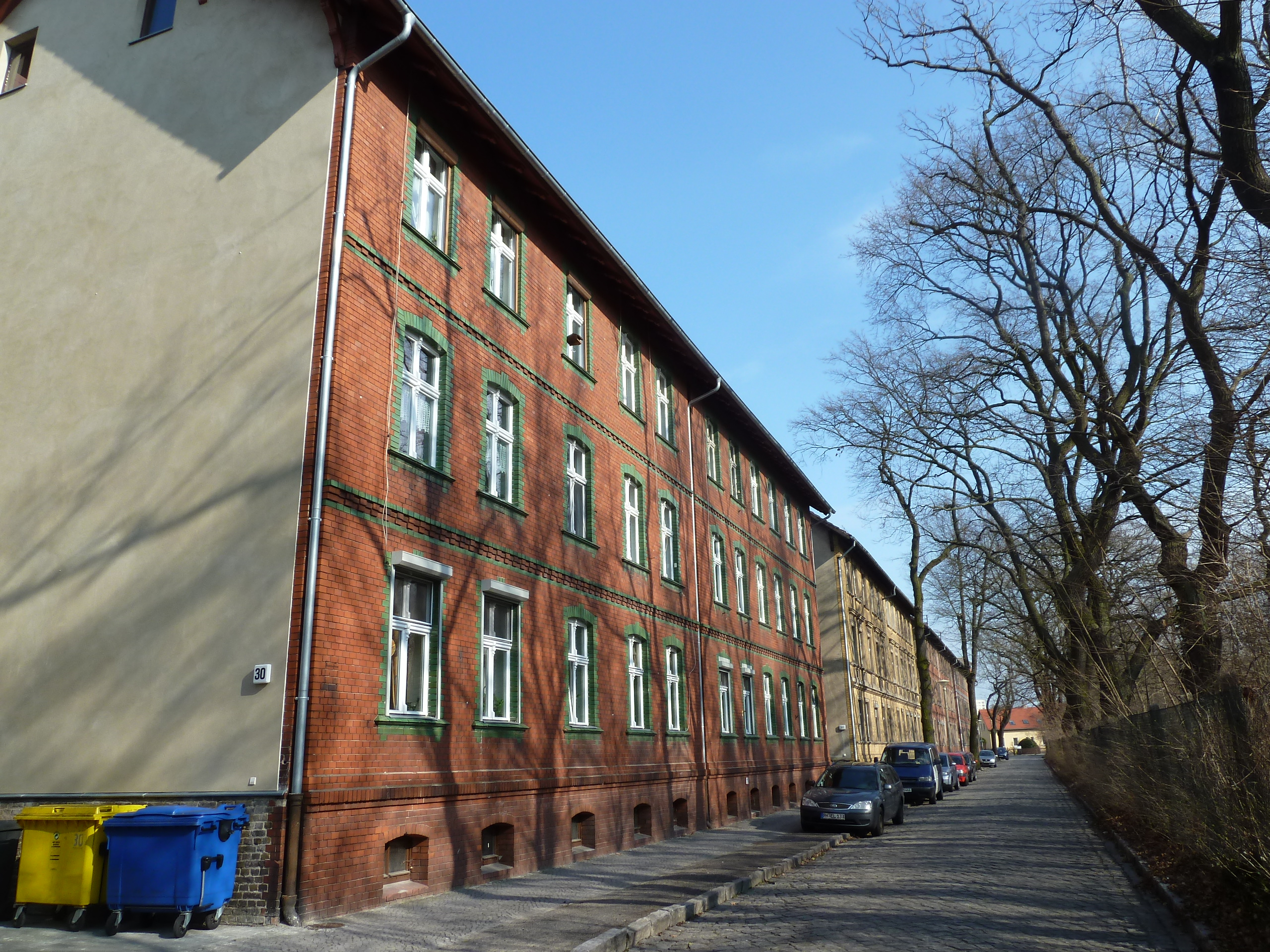 Potsdam Kolonie Daheim, ehemalige Eisenbahnersiedlung, Baudenkmal